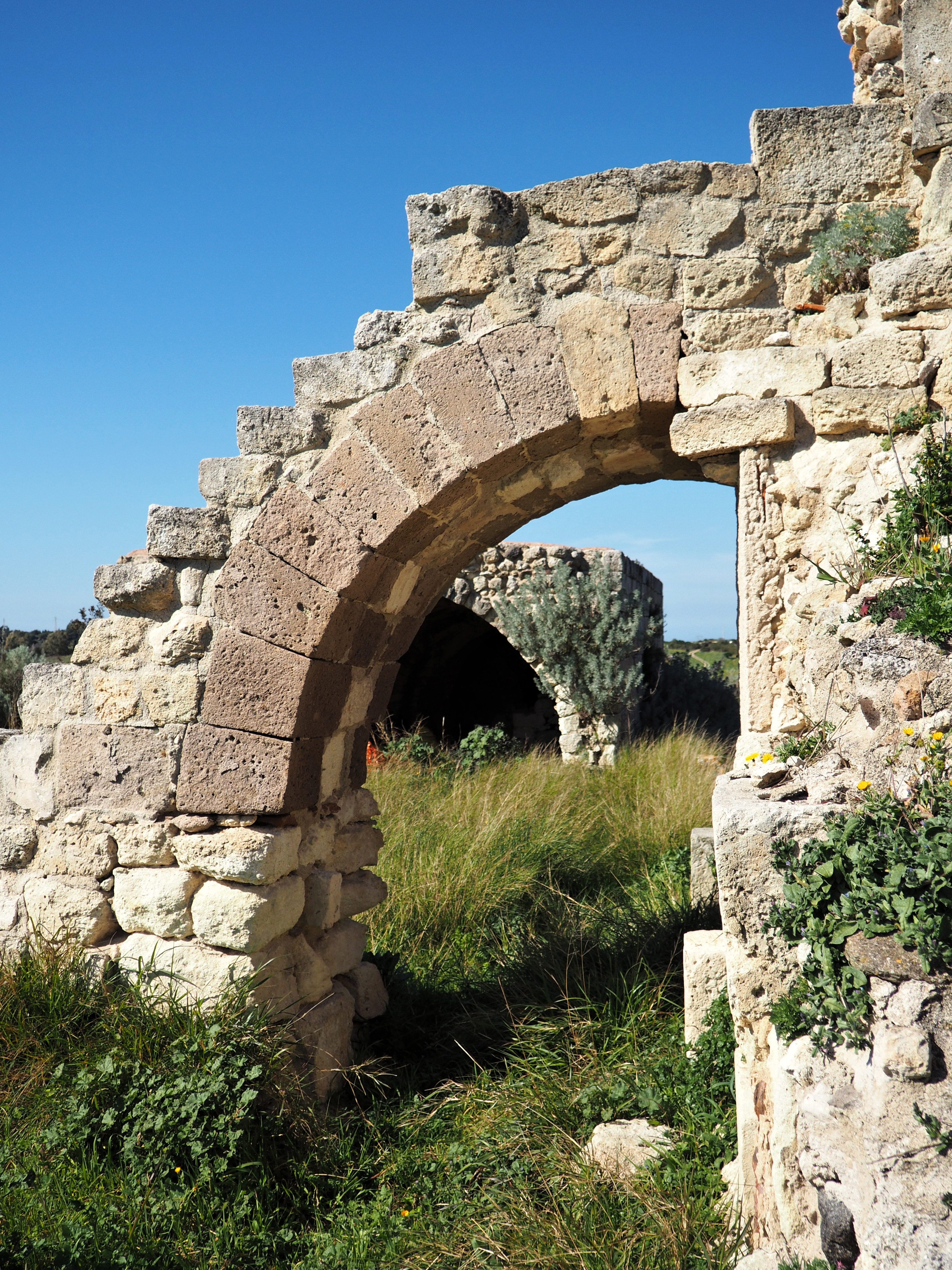 Resti di un arco in trachite che poggiano su una struttura in tufo arenaceo.